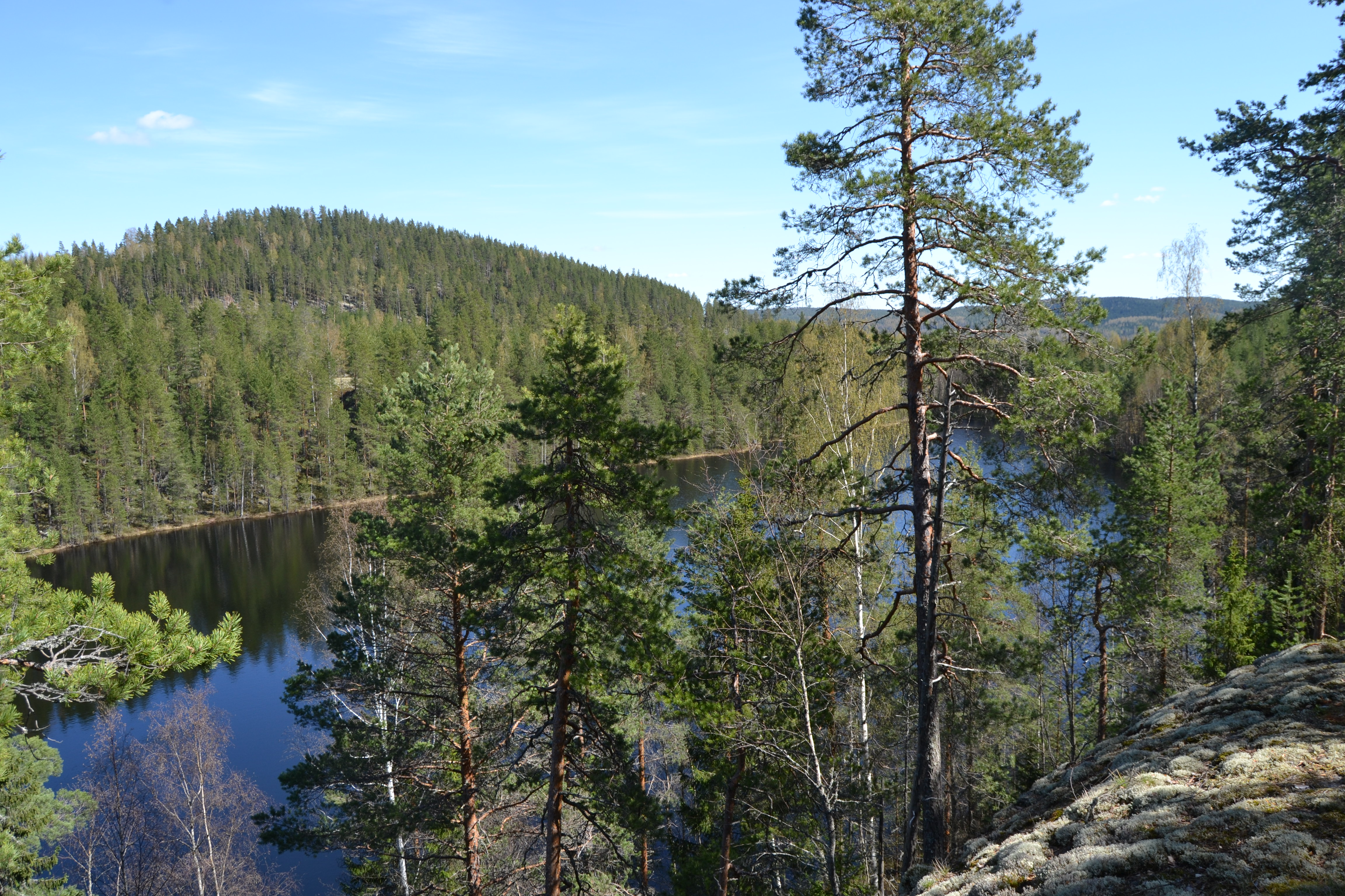 Velakallionlampi